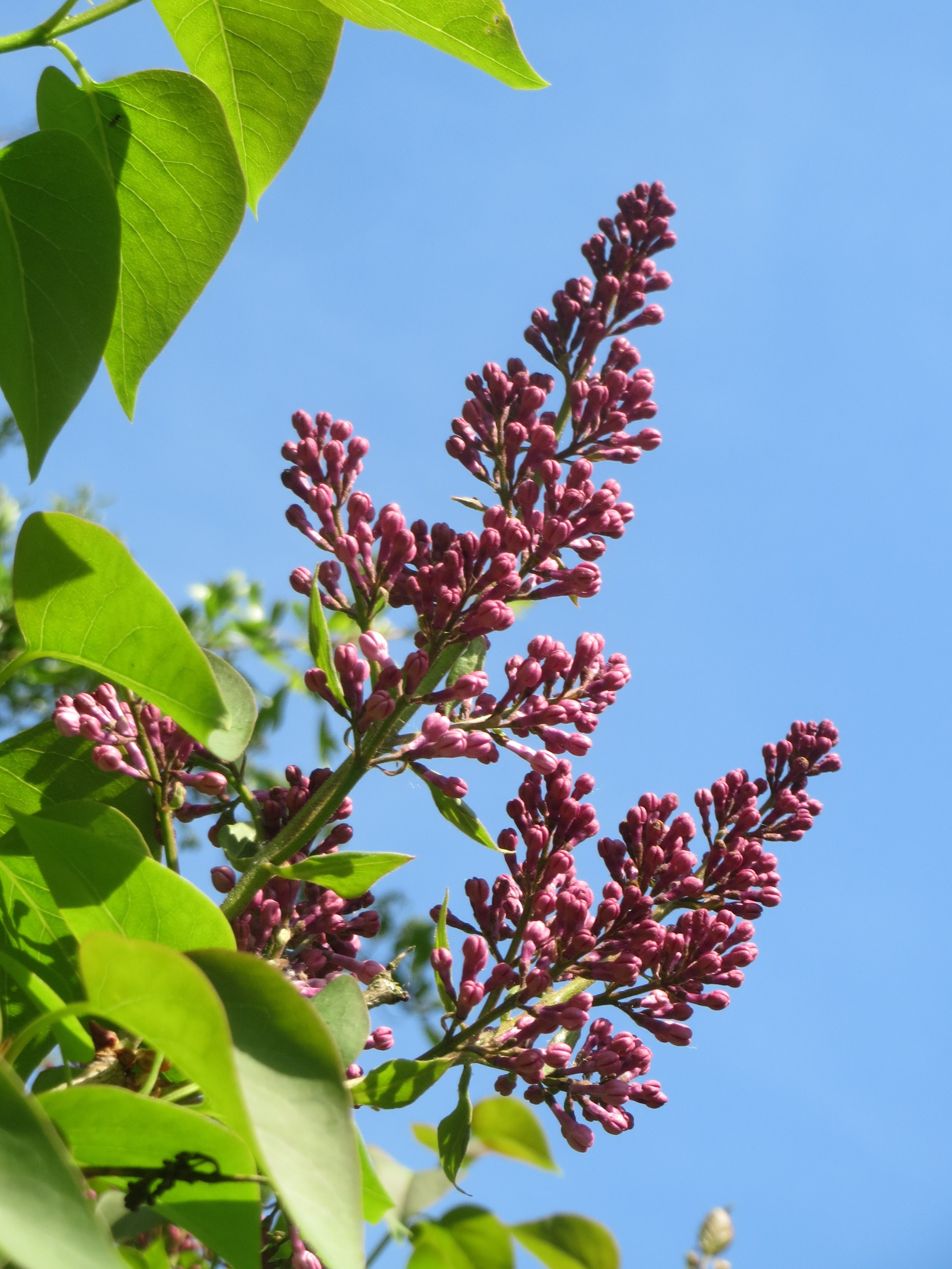 Blütenknospen vom Gemeinen Flieder (Syringa vulgaris) im Landschaftsschutzgebiet „Tabakmühlental - Oberster Weiher“ im Almet in Sankt Arnual